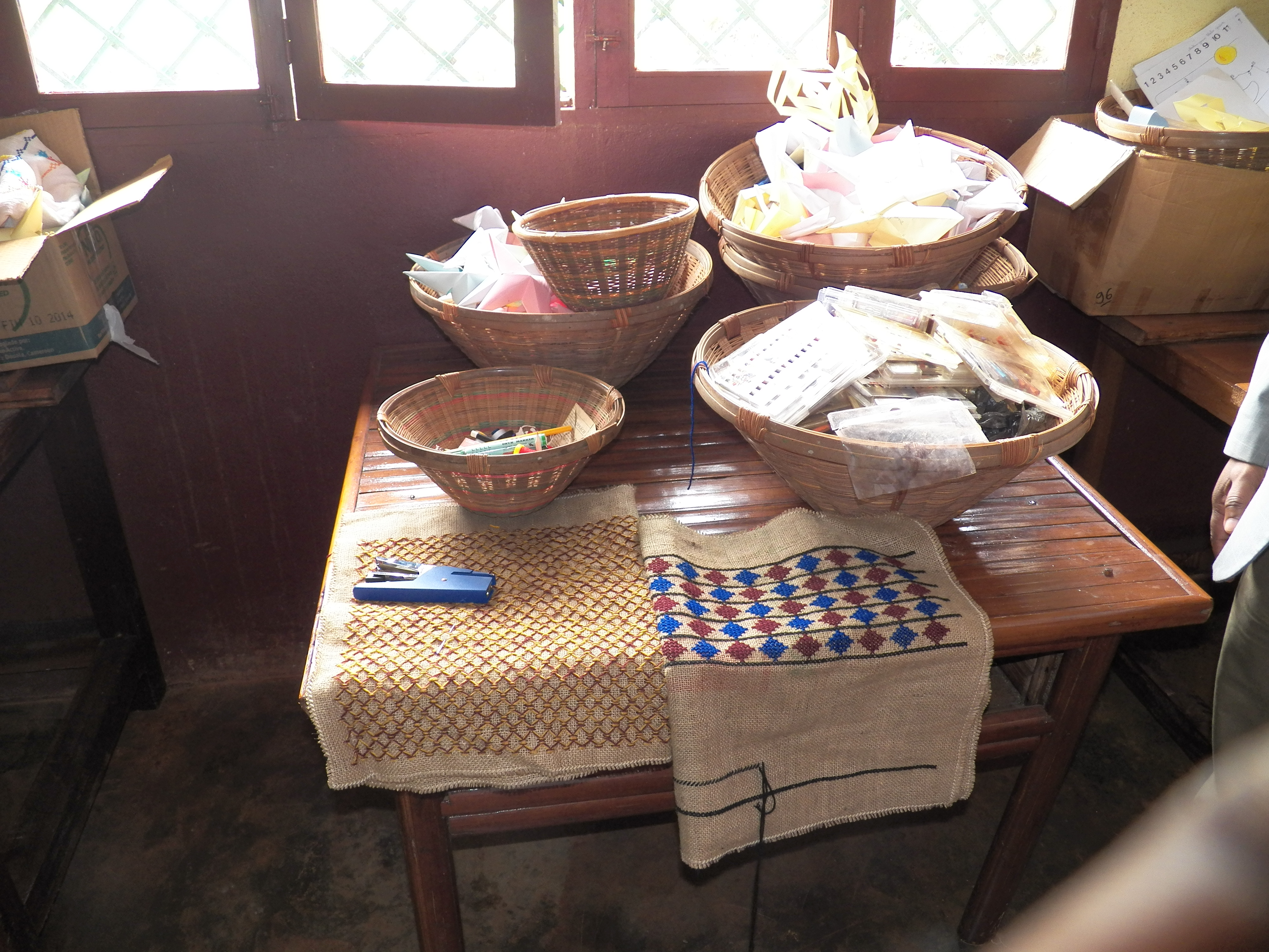 Faits par des élèves